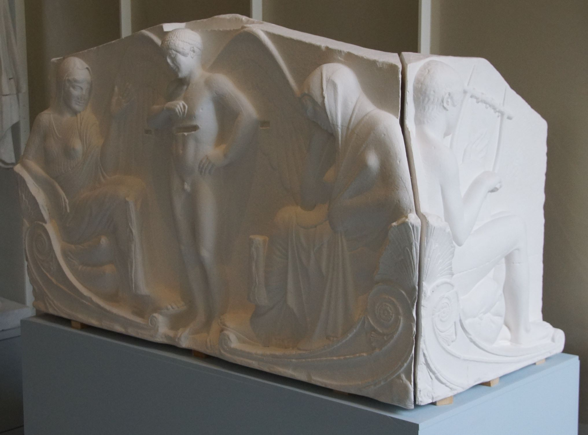 Gipsabguss des Bostoner Throns in Tübingen von rechts